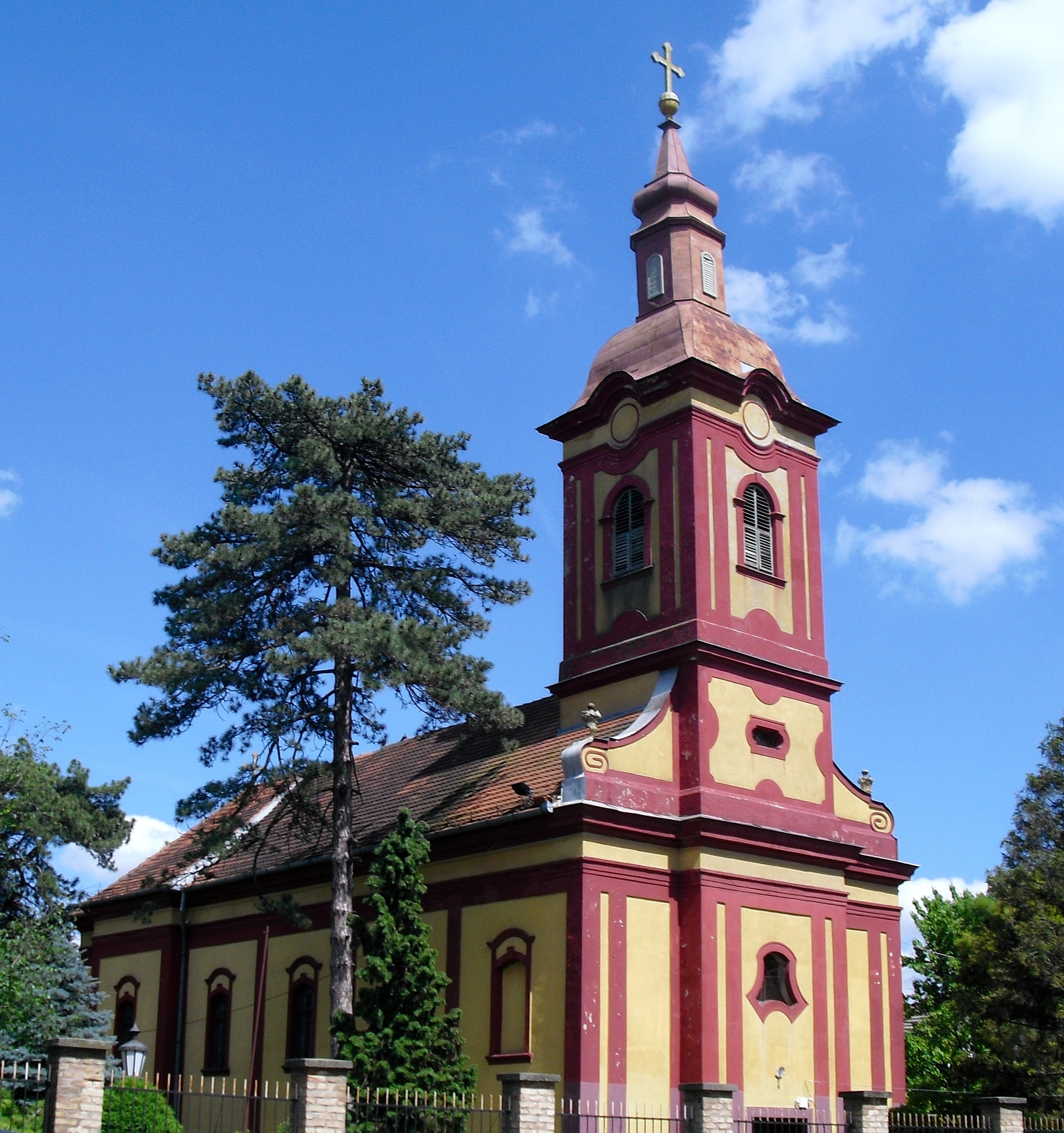 Српска православна црква Св. Арханђела Михаила у Кањижи...